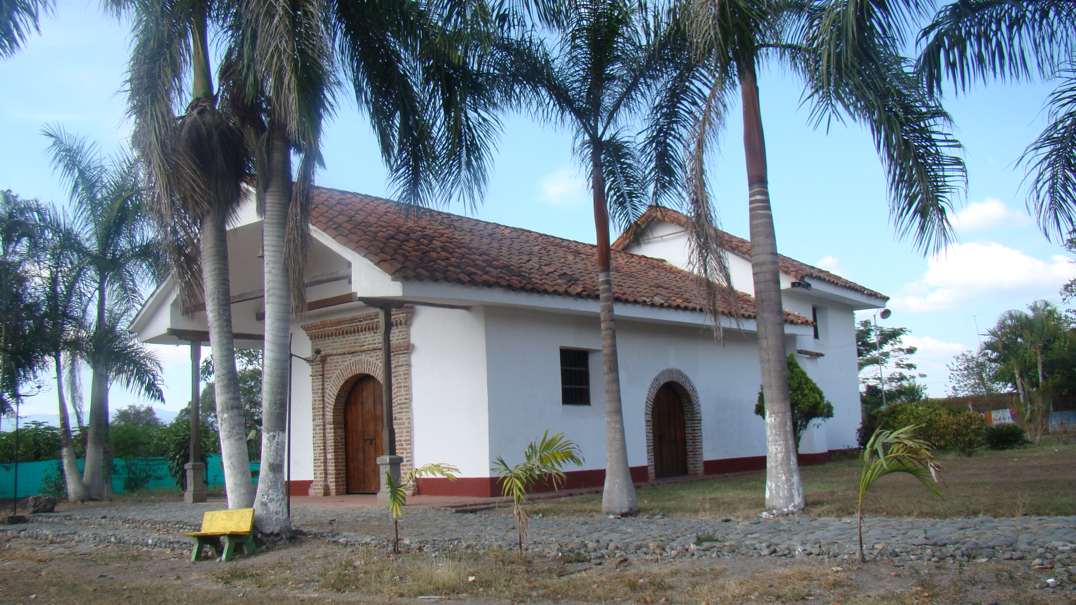 Capilla de Nuestra Señora de La Concepción